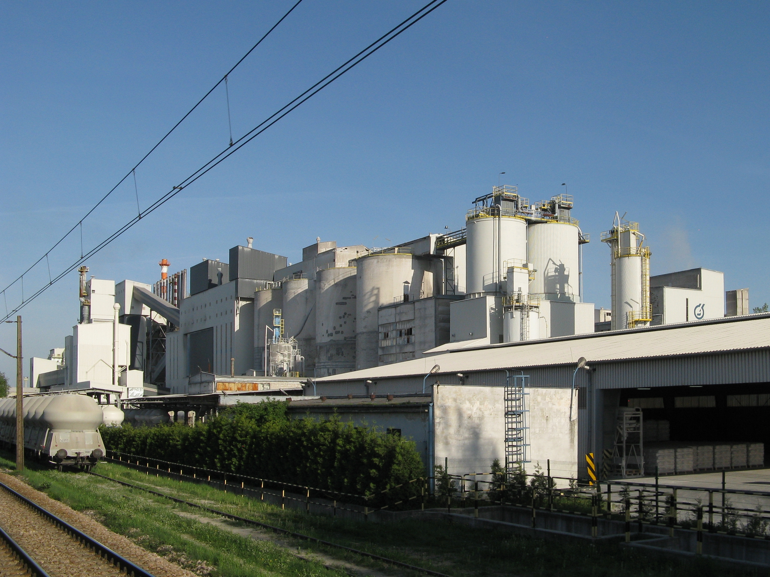 Cementownia Lafarge w Małogoszczu, widok od strony torów kolejowych.